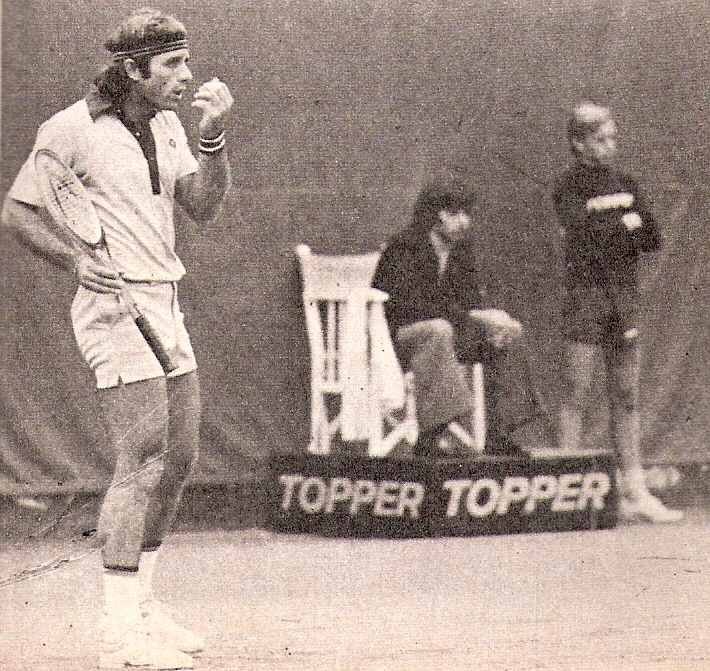 Guillermo Vilas, tenista argentino